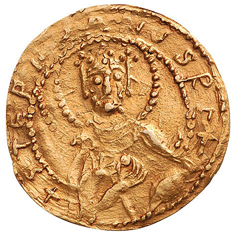 Szent István király aranypénze. Egyes források szerint talán nem is István, hanem annak szentté avatása idején I. László bocsátotta ki. Összesen három darab maradt fenn. Tömege: 4,52 g, megegyezik a bizánci solidusszal. Felirata: STEPHANVS REX, illetve PANNONIA.